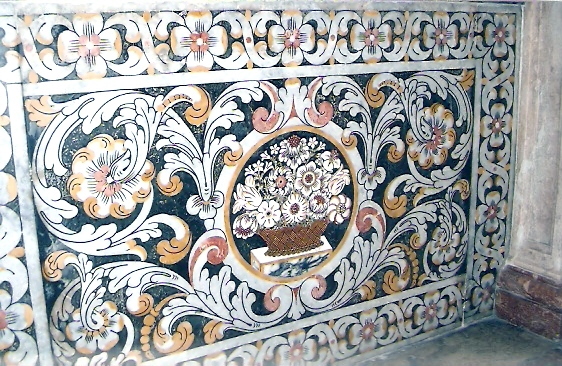 EMBUTIDOS